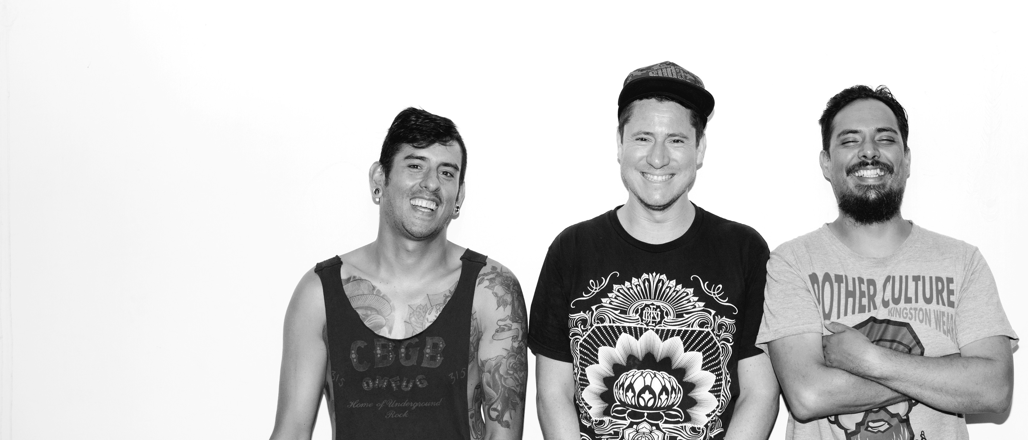 Foto promocional